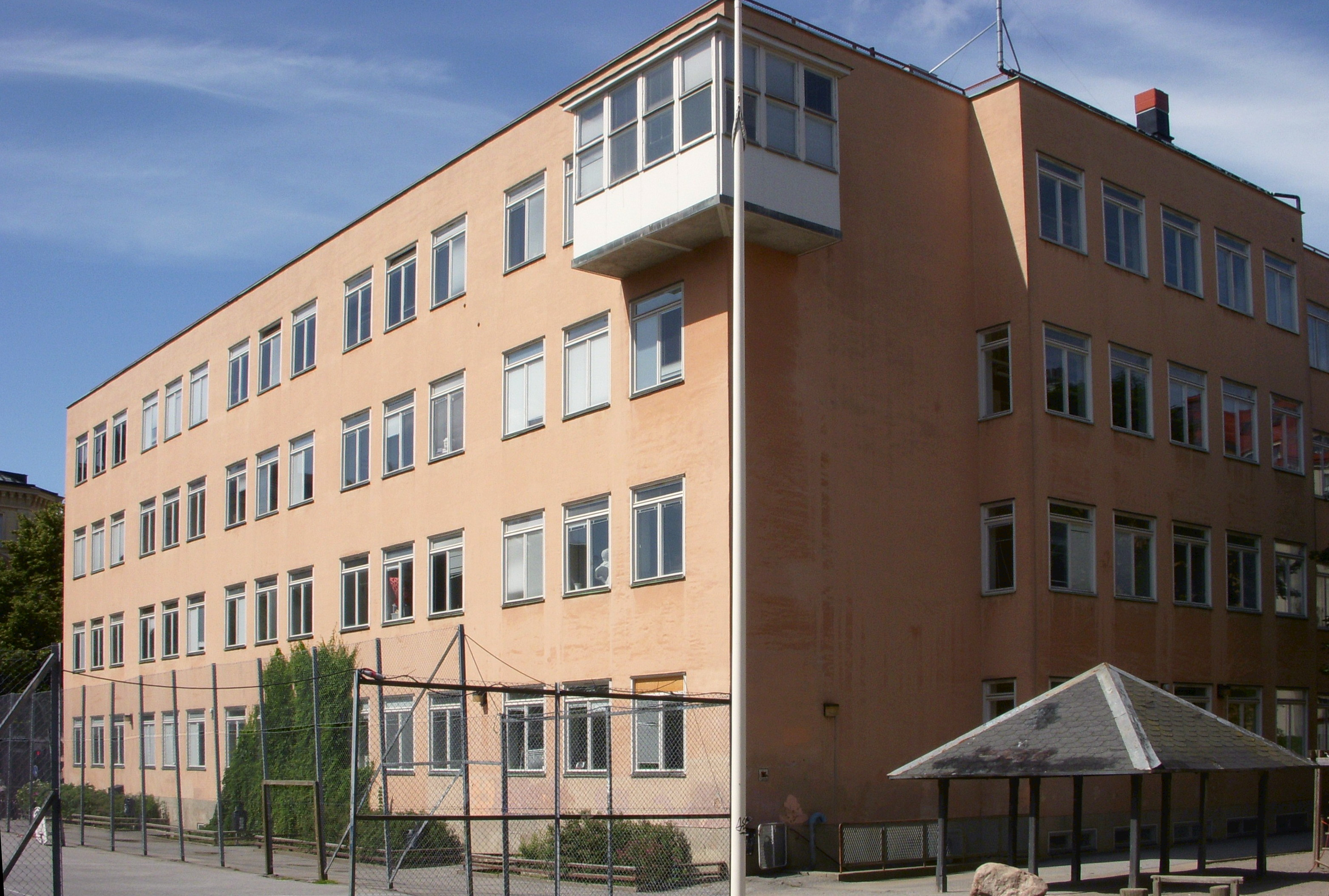 Södermalmsskolan på Södermalm, Stockholm